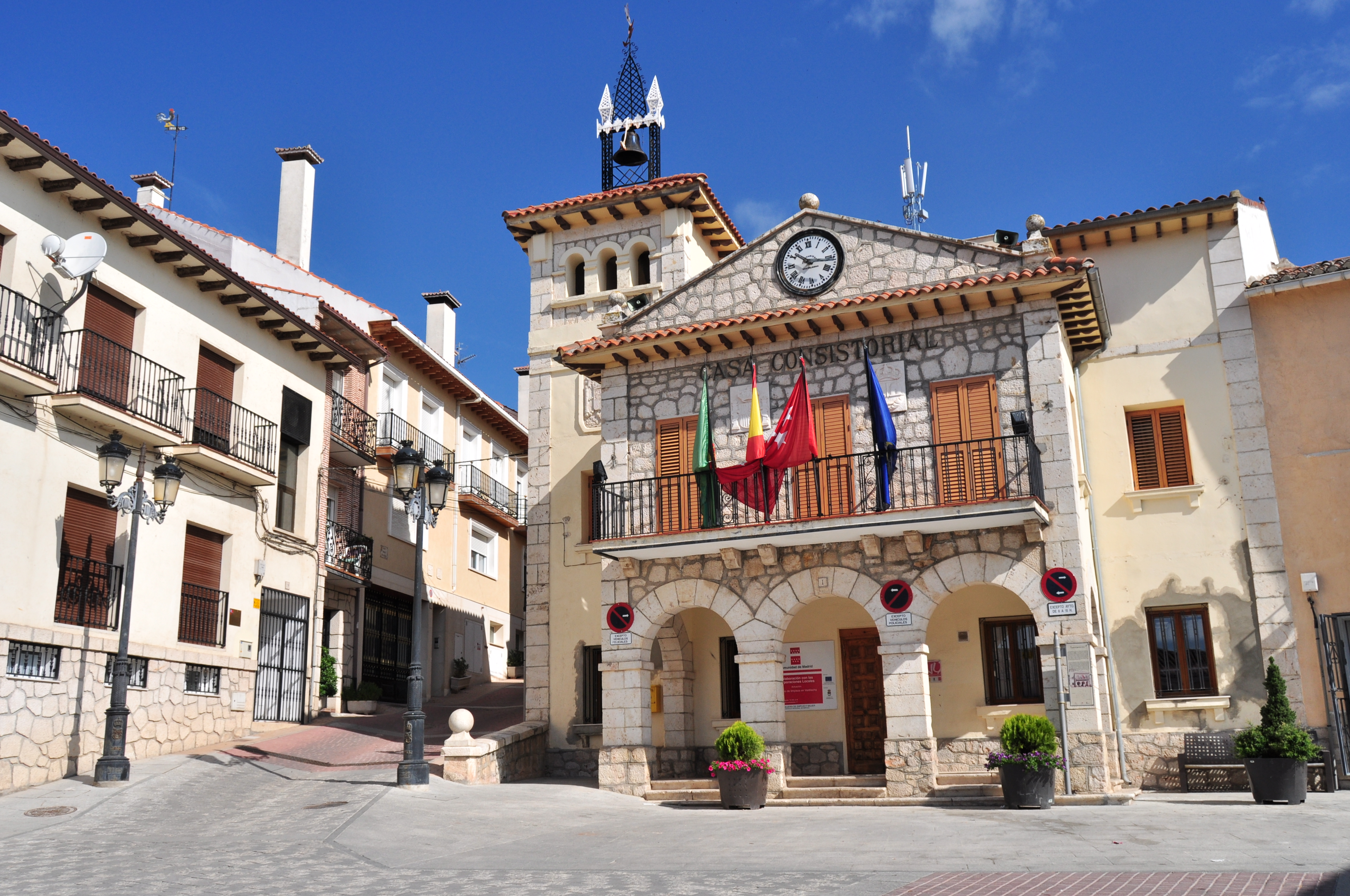 Valdilecha - 004